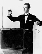 LeonTheremin